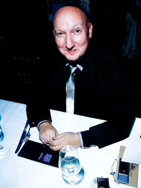 British milliner Stephen Jones